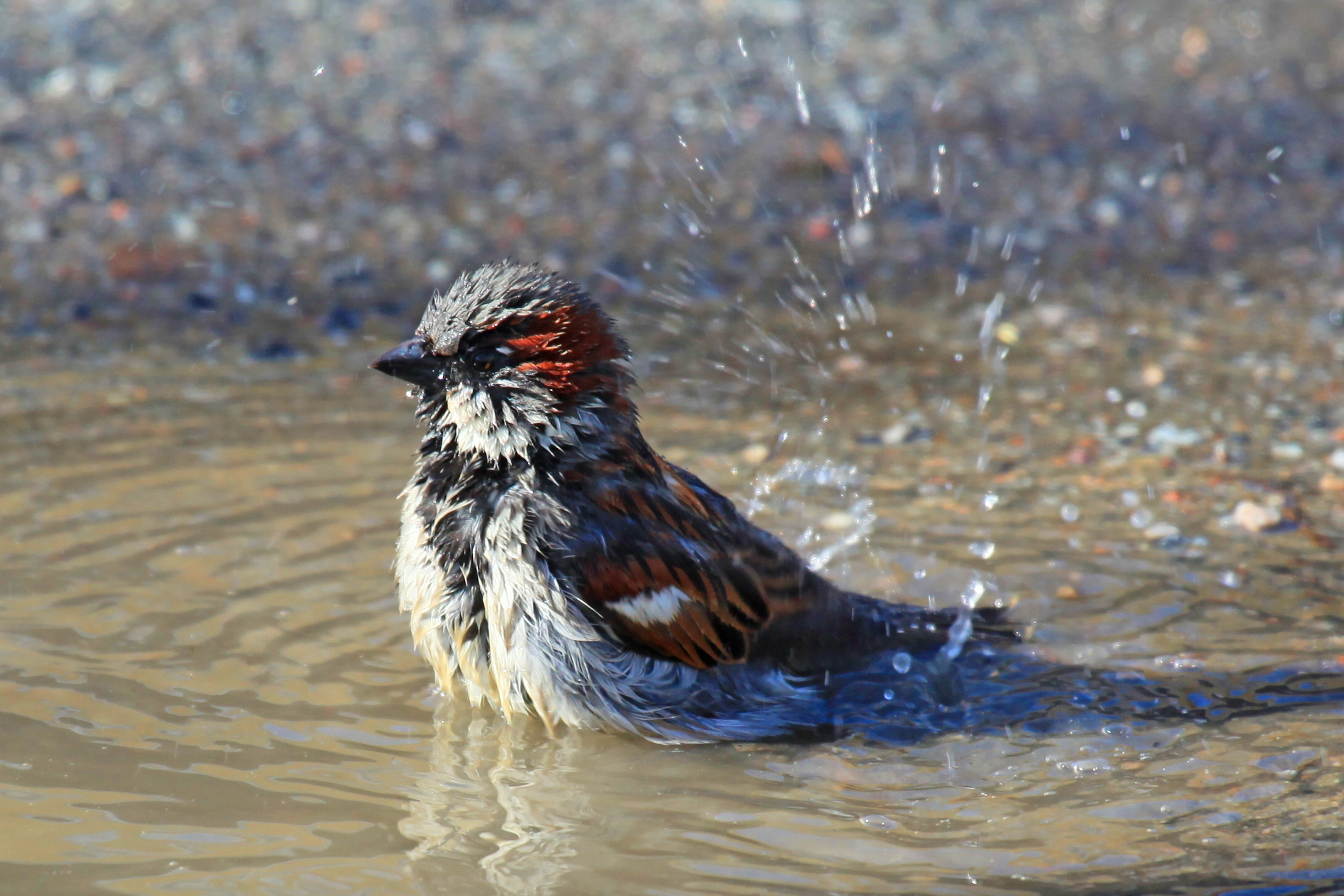 Gråsparv, House sparrow, Passer domesticus, Vaxholm, Stockholm, Sweden